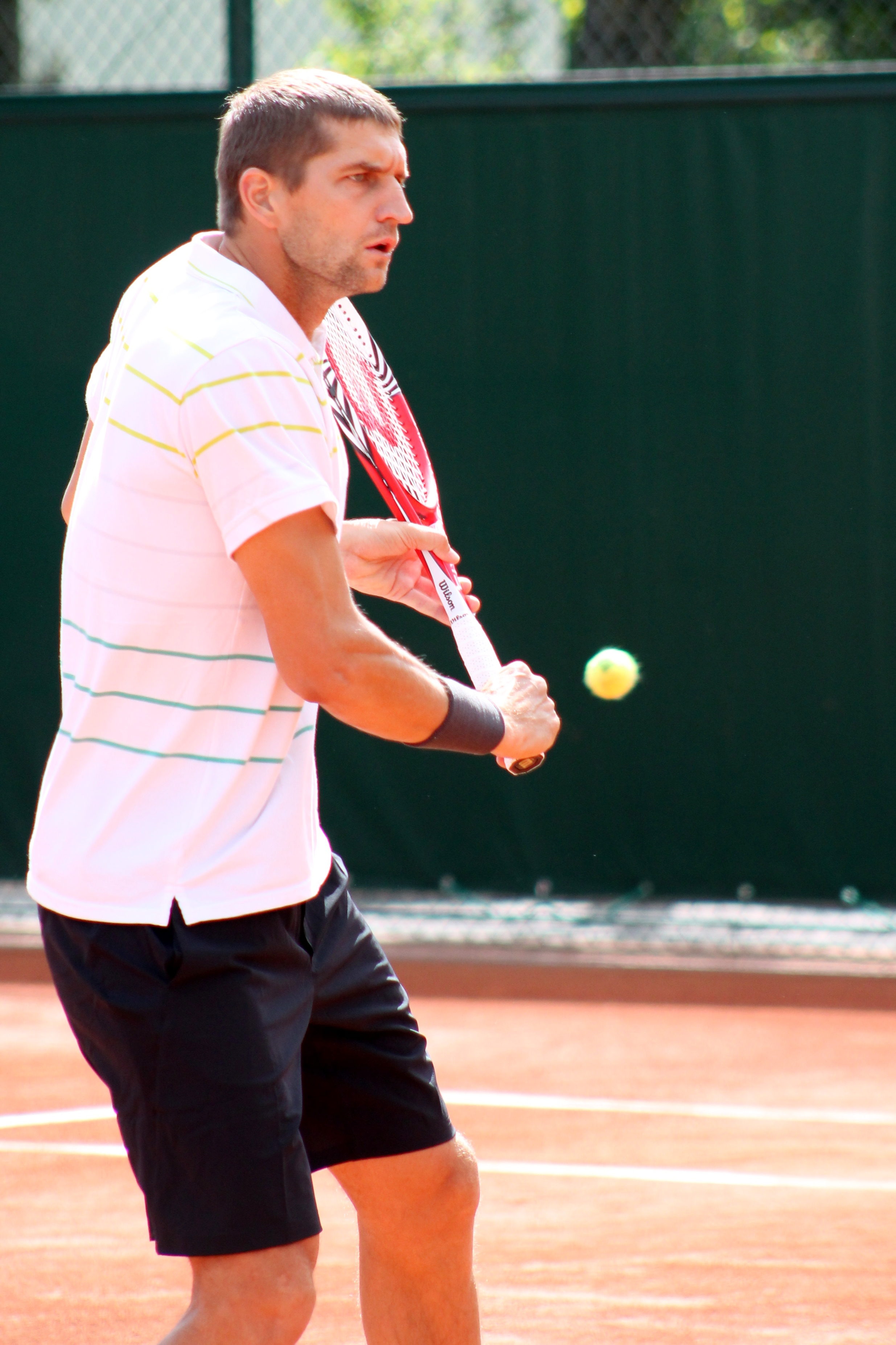 Mirnyi RG13 (9)